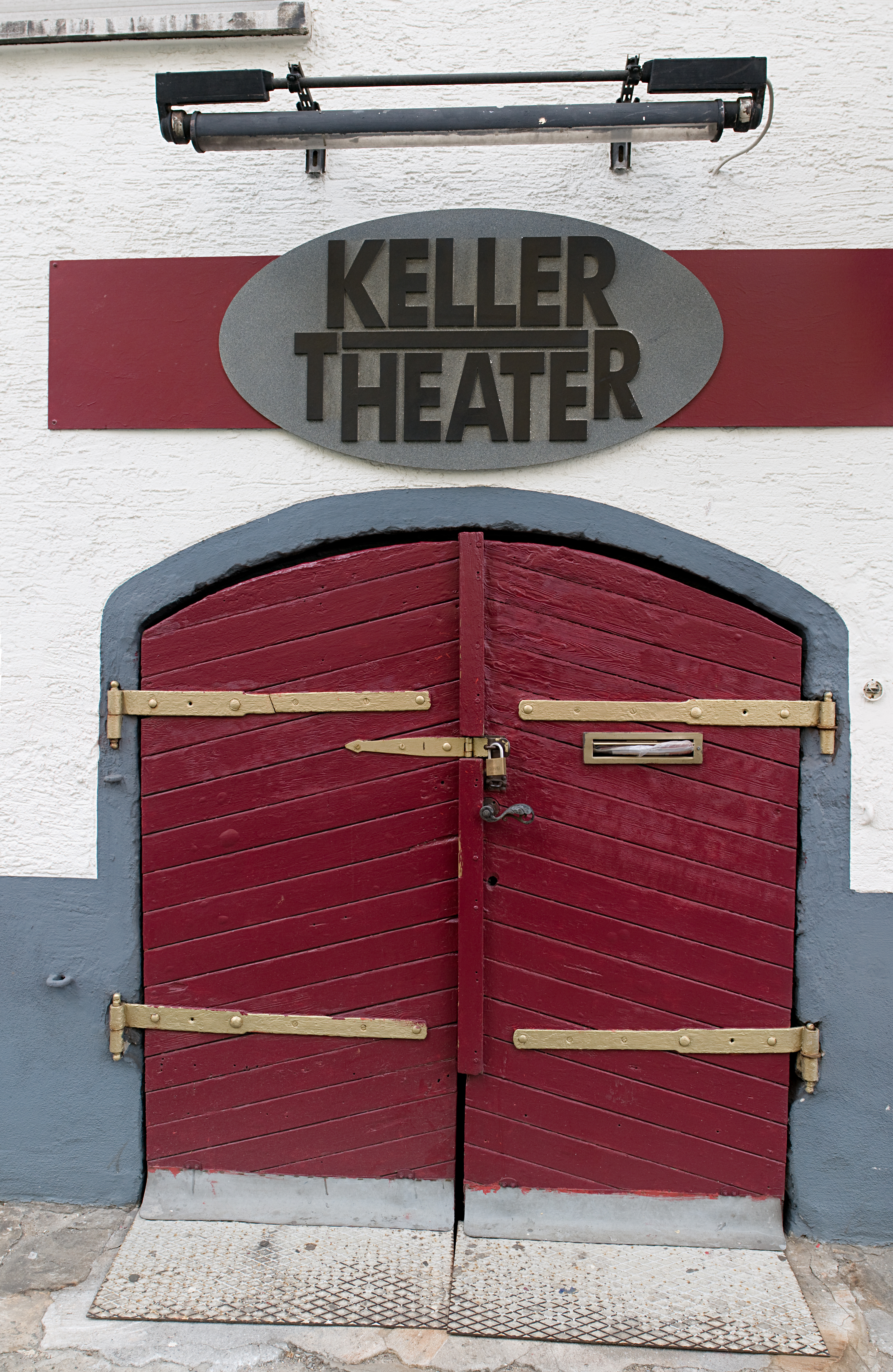 Eingang des Kellertheaters in der Mainstraße Frankfurt am Main